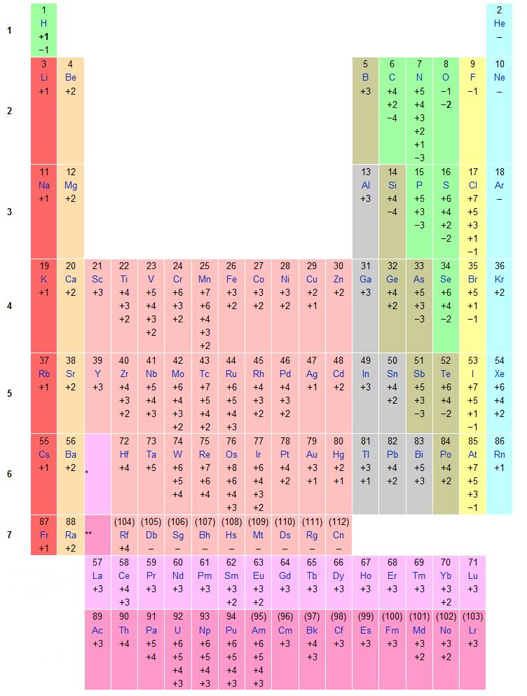 Oksüdatsiooniastmed